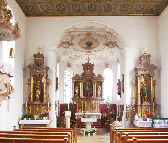 Katholische Pfarrkirche St. Johannes Baptista, Aufheim, Stadt Senden (Bayern)